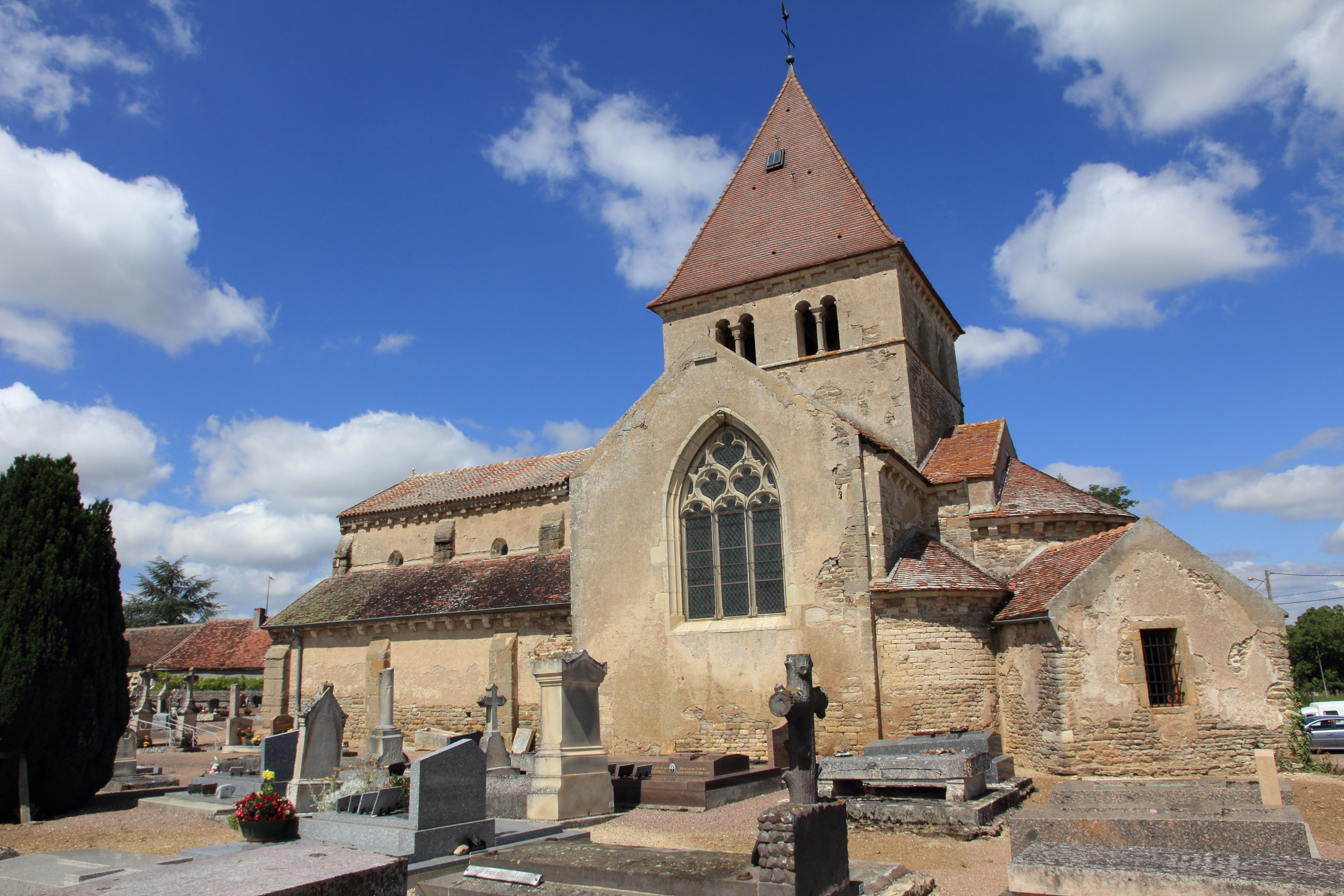 Église de Vic-de-Chassenay